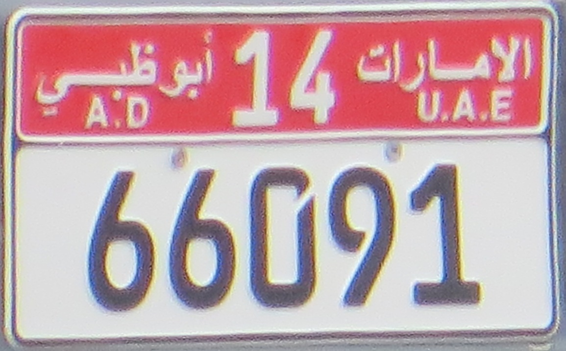 Kentekenplaat uit Abu Dhabi